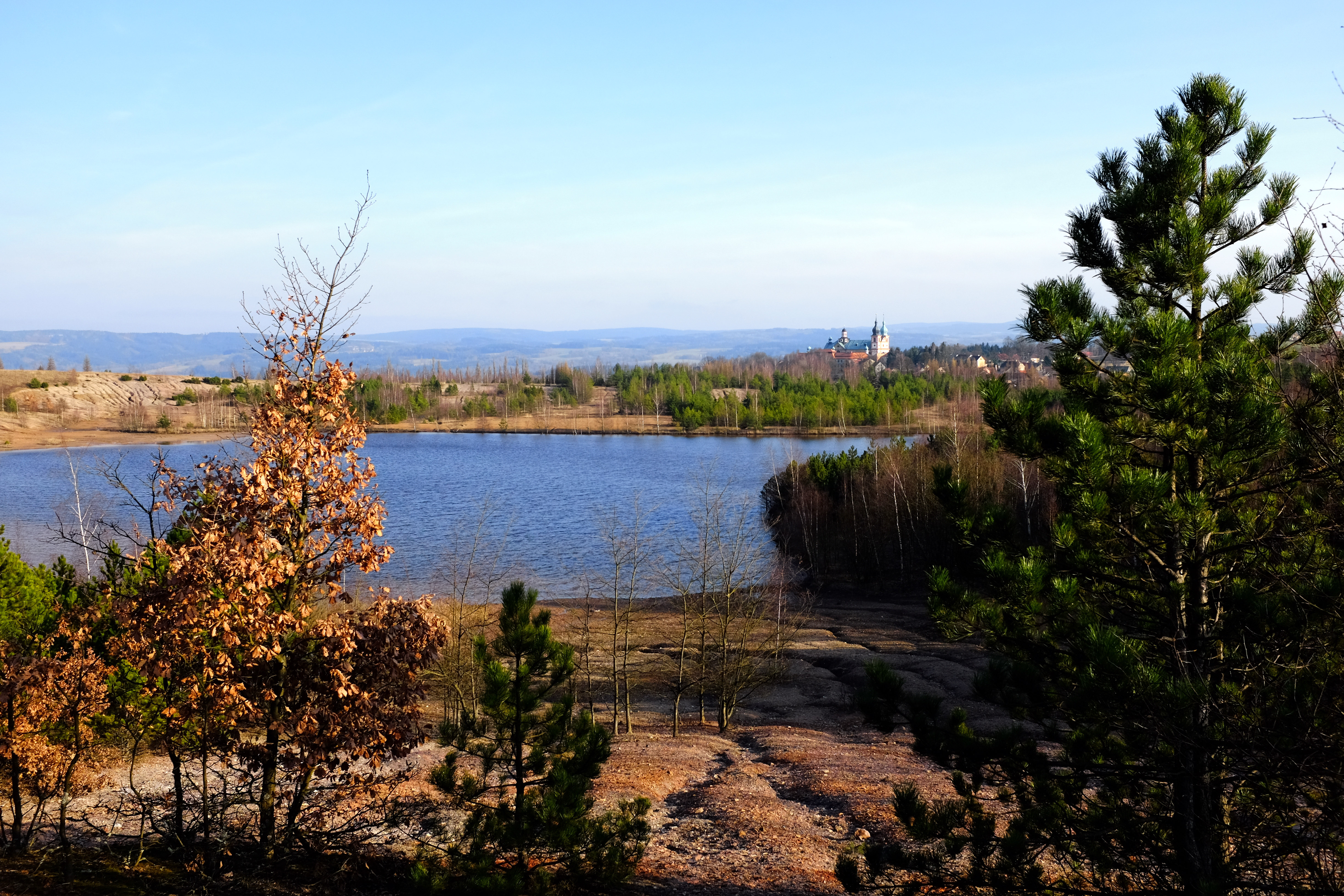 Lítovská výsypka, pohled na jezero na výsypce, okres Sokolov